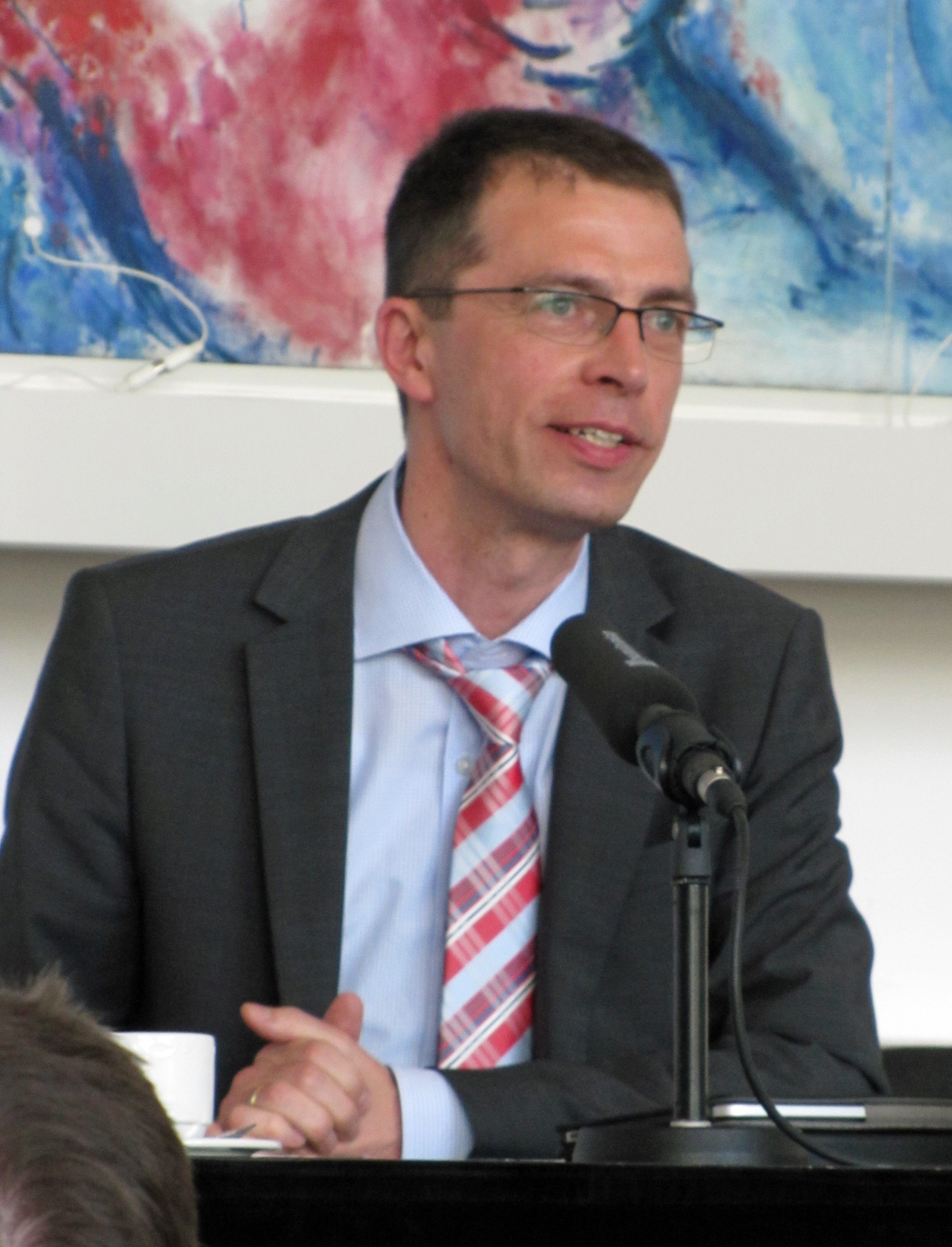 Paul Nolte, 2012 bei den Roemerberggespraechen in Ffm.